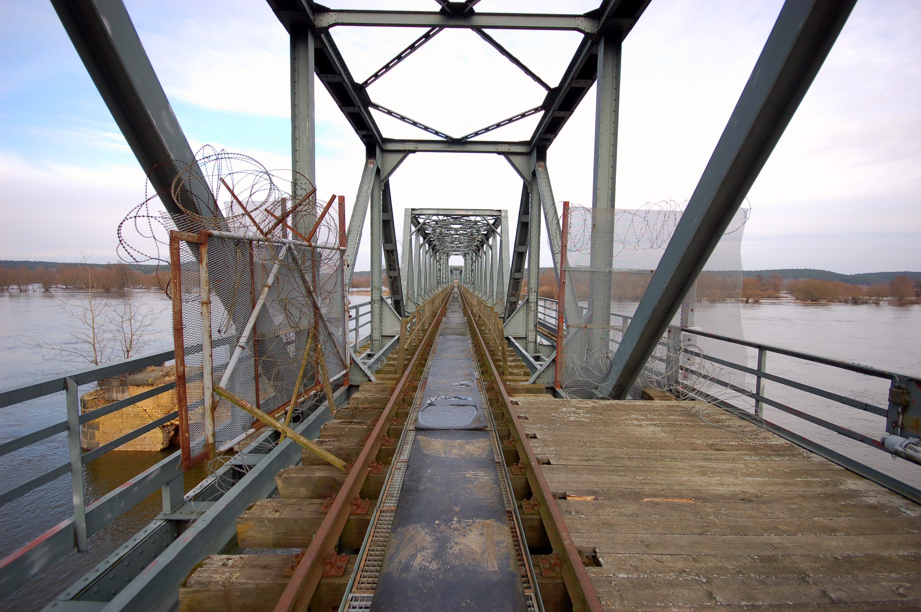 Oderbrücke Bienenwerder, Bahnhof Siekierki, Bahnhof Neu Rüdnitz 13.02.2011